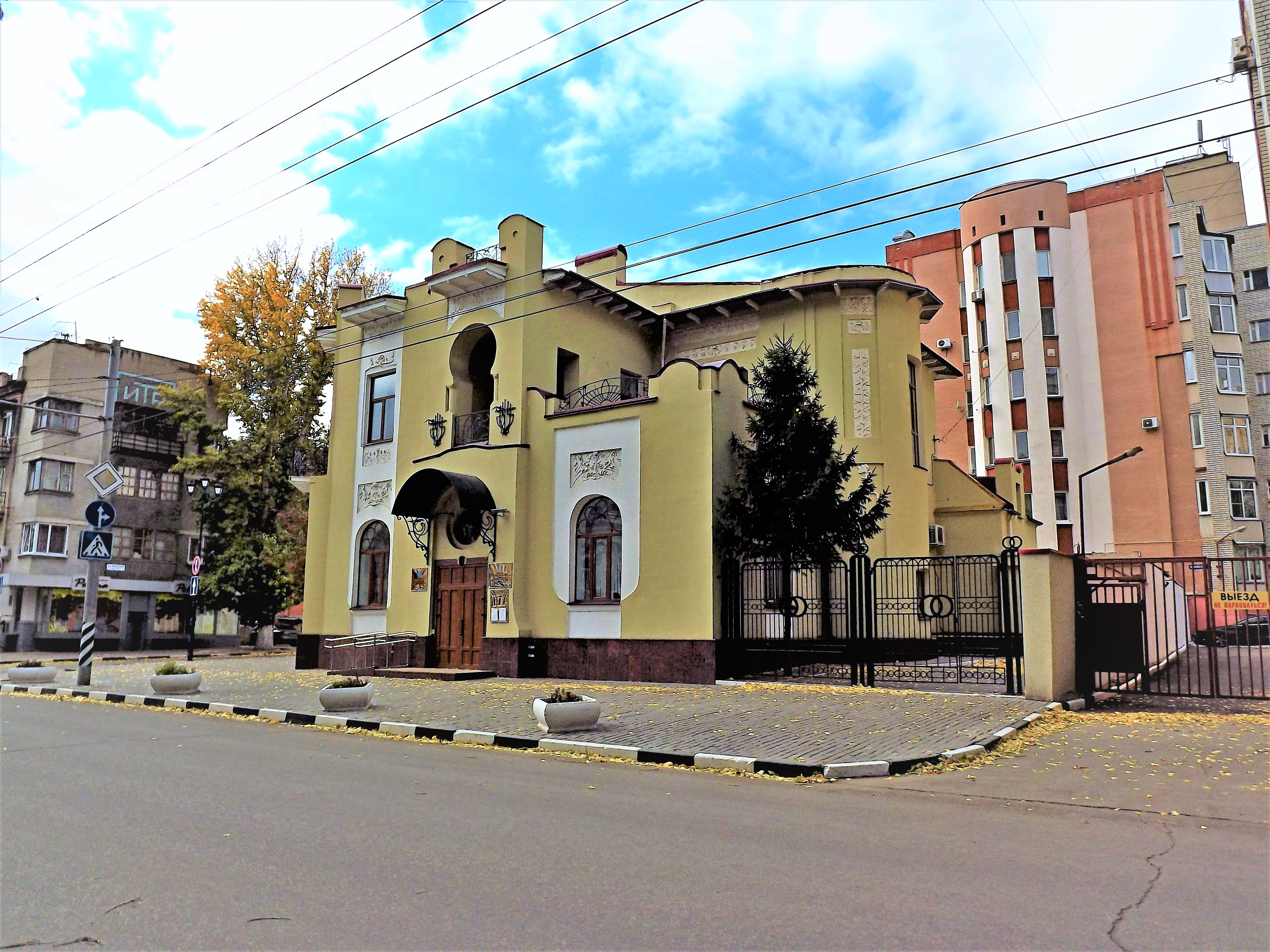 Дом Бореля (купеческая биржа) (особняк) (Саратовская область, Саратов, Волжская улица, 22, Некрасова улица, 25)